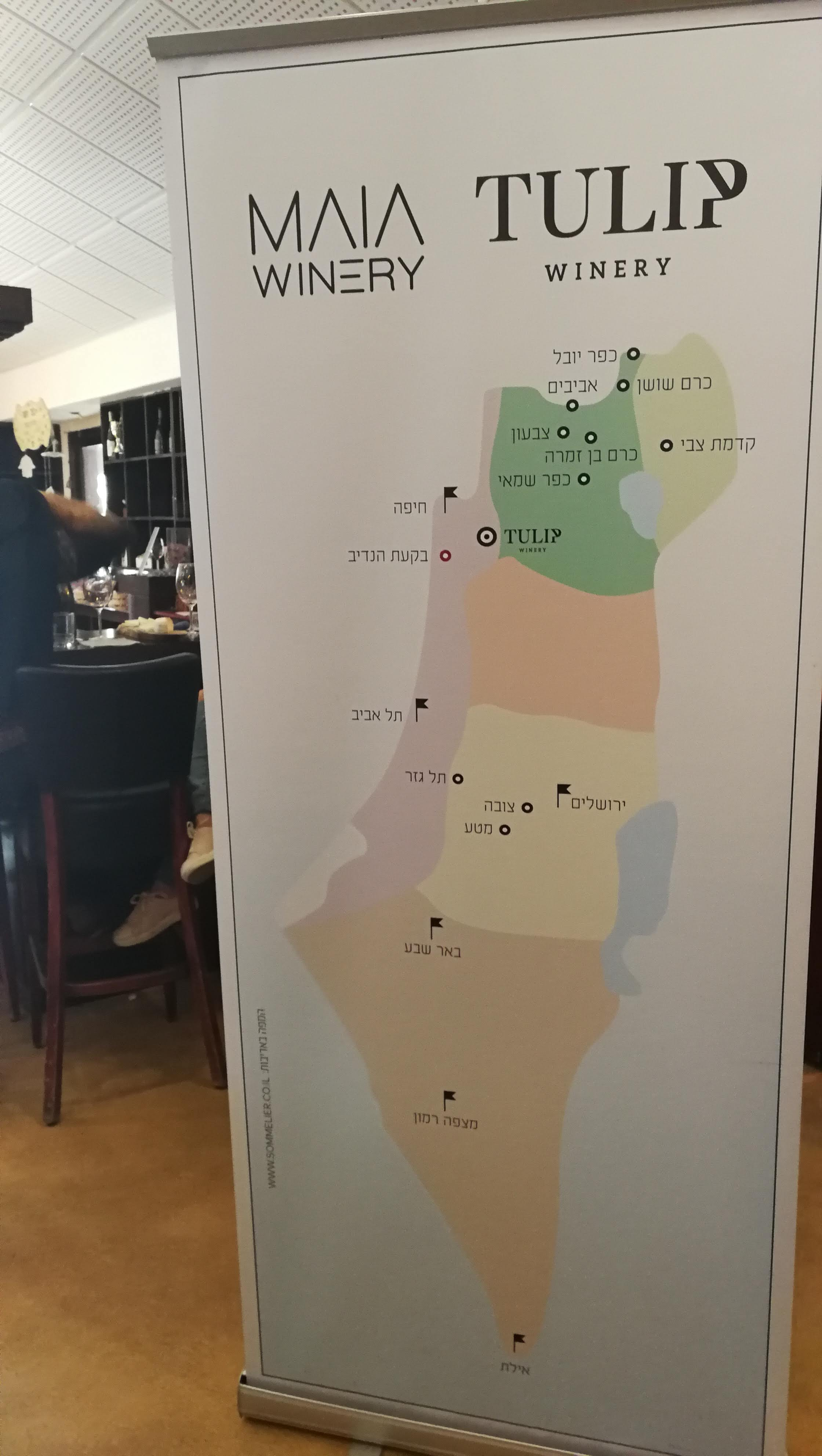 מפת כרמים, יקב טוליפ, כפר תקווה